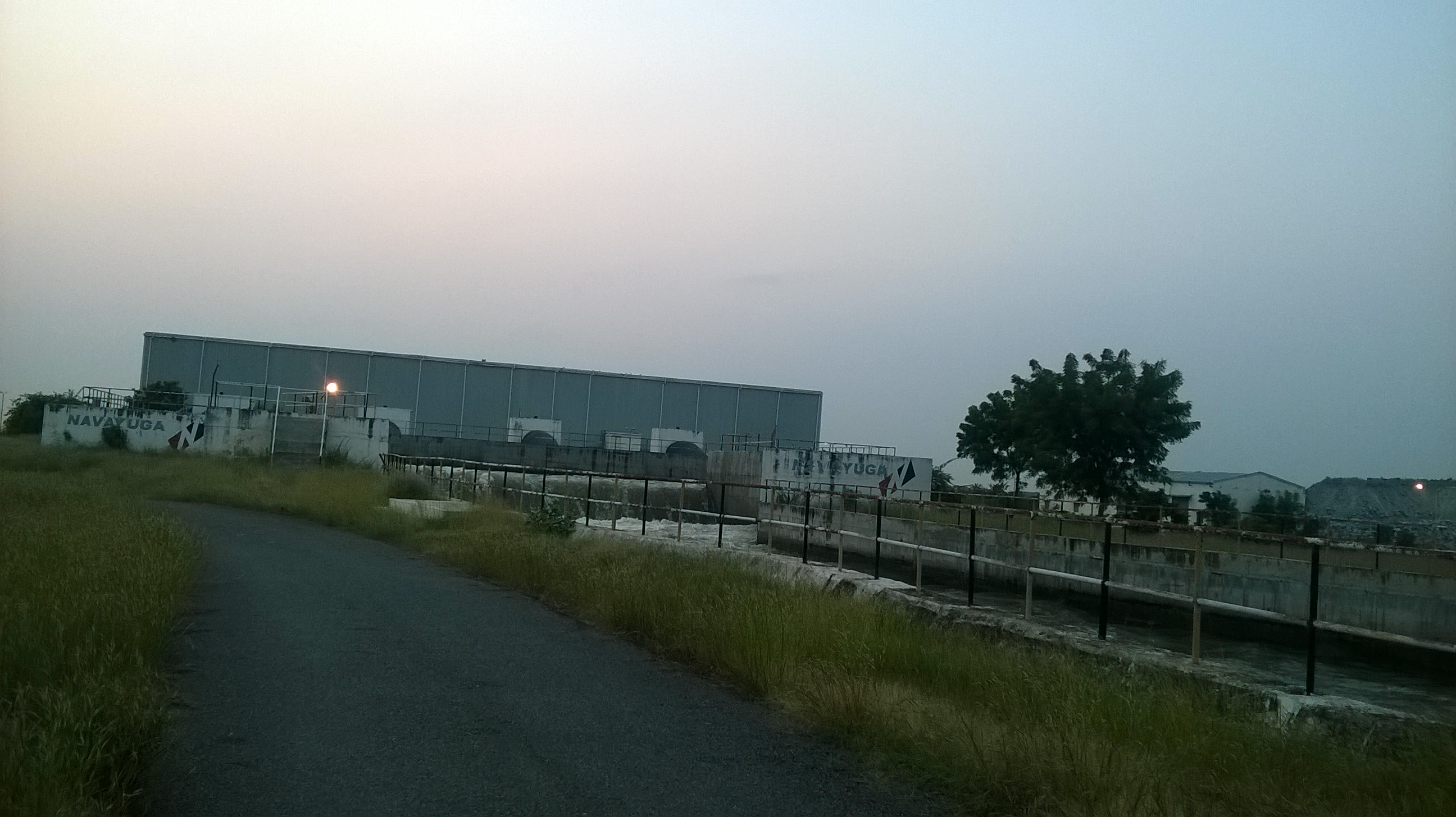 రాజీవ్ భీమా ఎత్తిపోతల పథకం-2 కేంద్రం